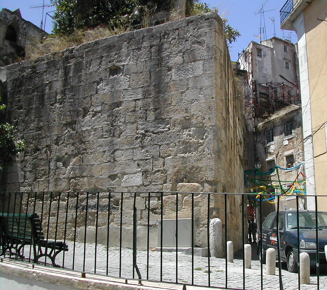 Torre de Alfama, Cerca Moura, Alfama, Lisboa, Portugal